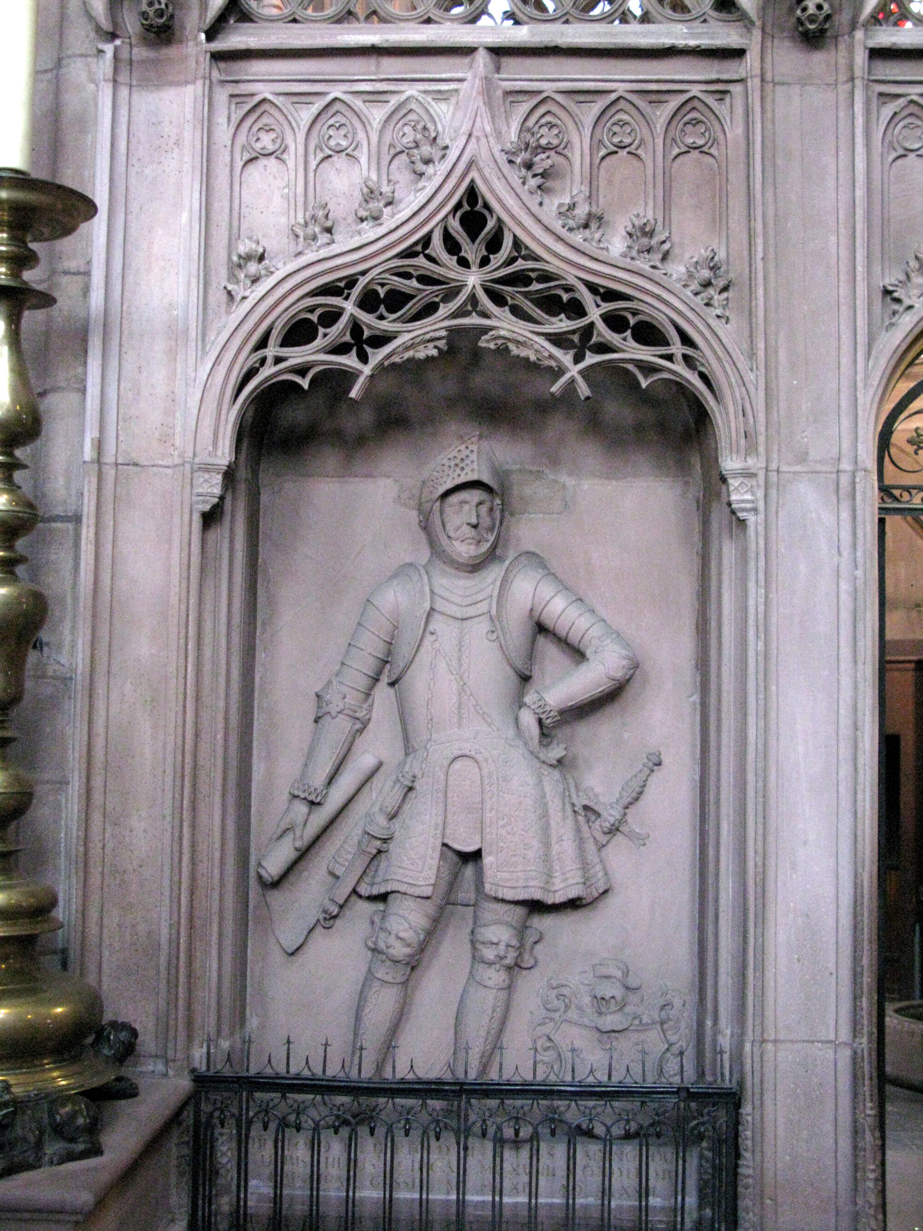 Berthold III. Reliefbildnis des Herzogs von Zähringen von Franz Xaver Hauser (1793) im Chor des Freiburger Münsters